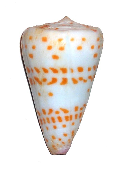 Conus Tessulatus Auteur, Barruel M.